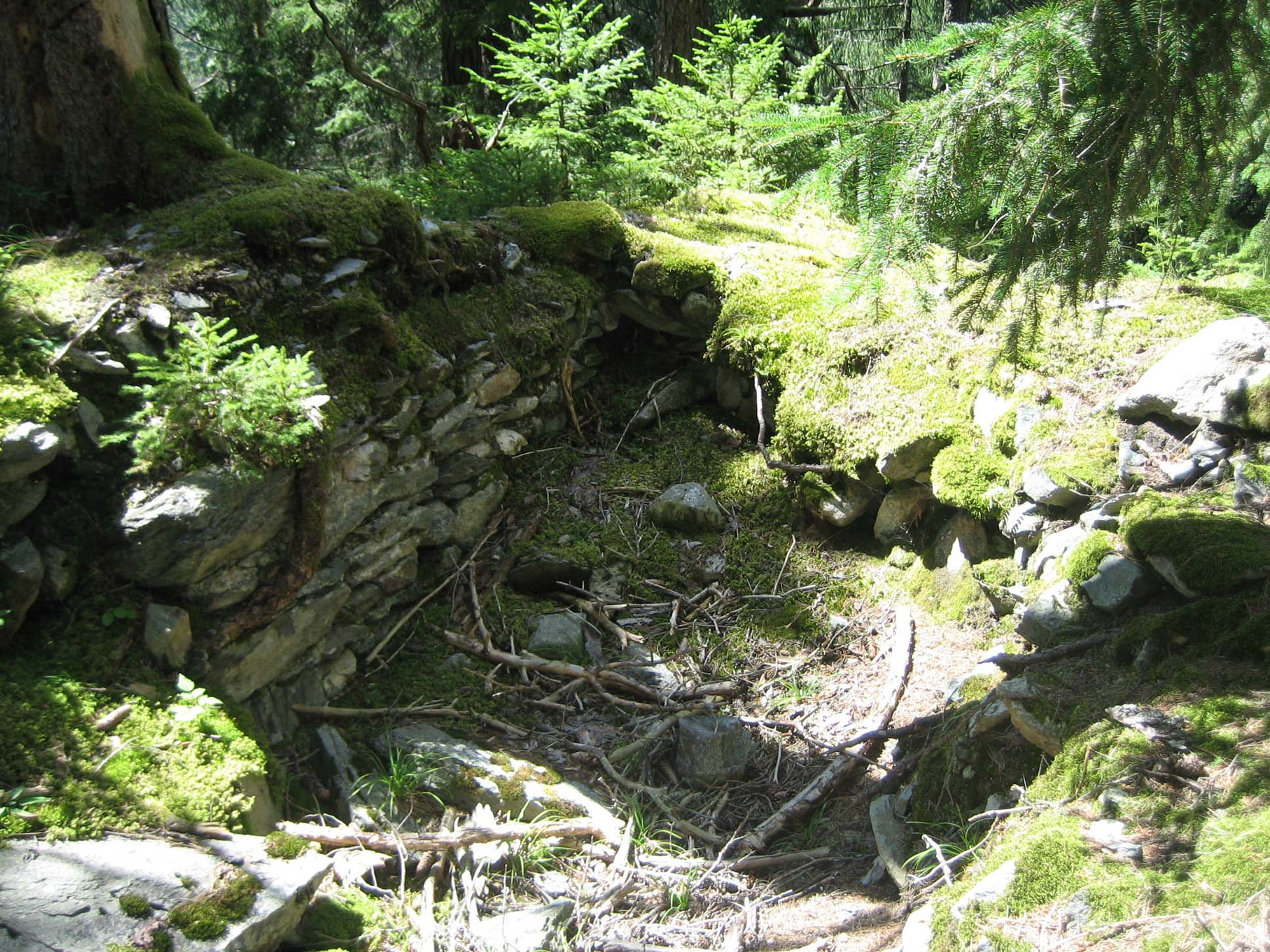 Turmfundament